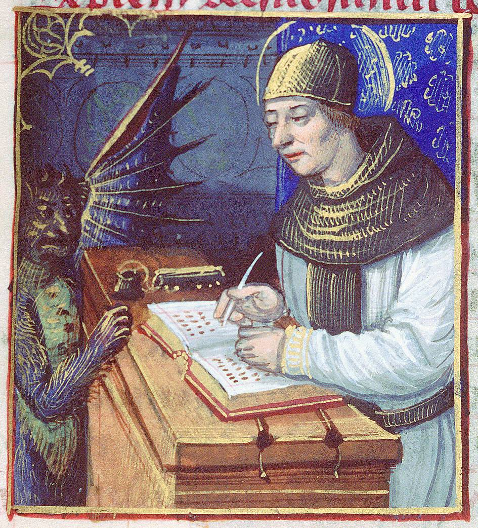 Representación de Titivillus en una iconografía antigua (s. XIV)